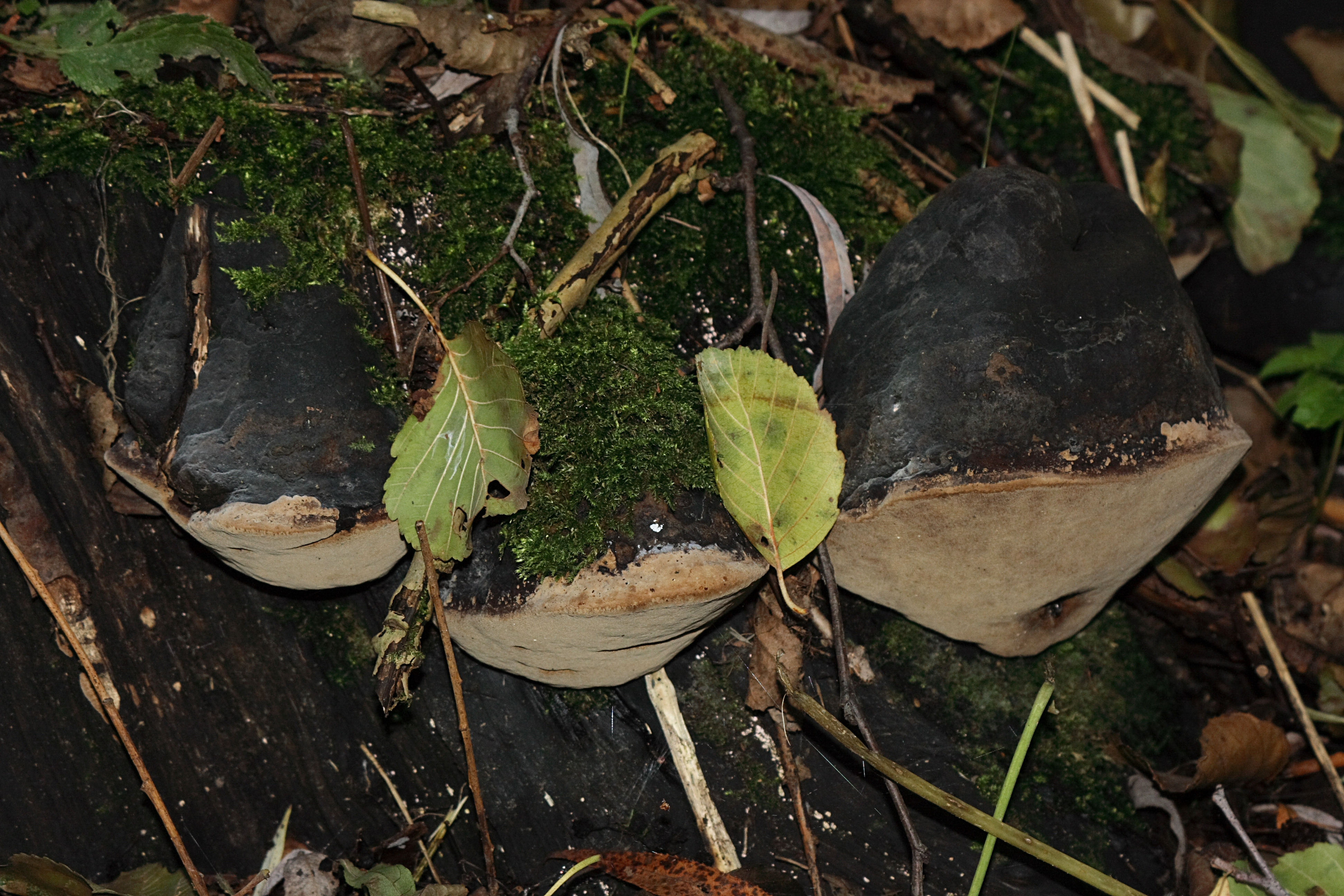 Na hrázi rybníka na starém pařezu nedaleko cesty rostlo více kusů ohňovce topolového